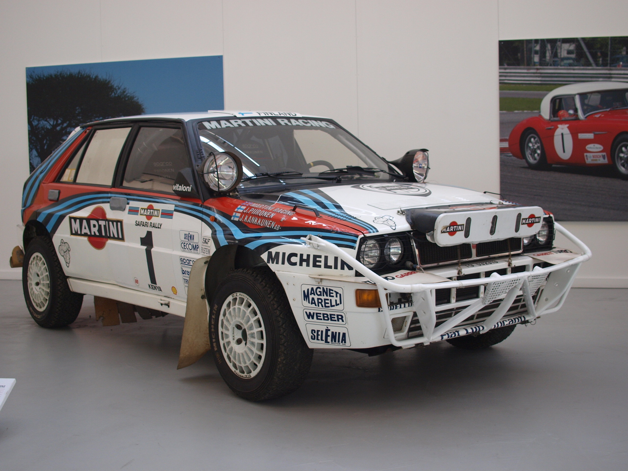 Lancia Delta HF Integrale Evoluzione Safari Gr.5 - #1 Kankkunen/Piironen, 2nd o/a Safari Rally 1992 On display at National Automobile Museum, Turin, Italy